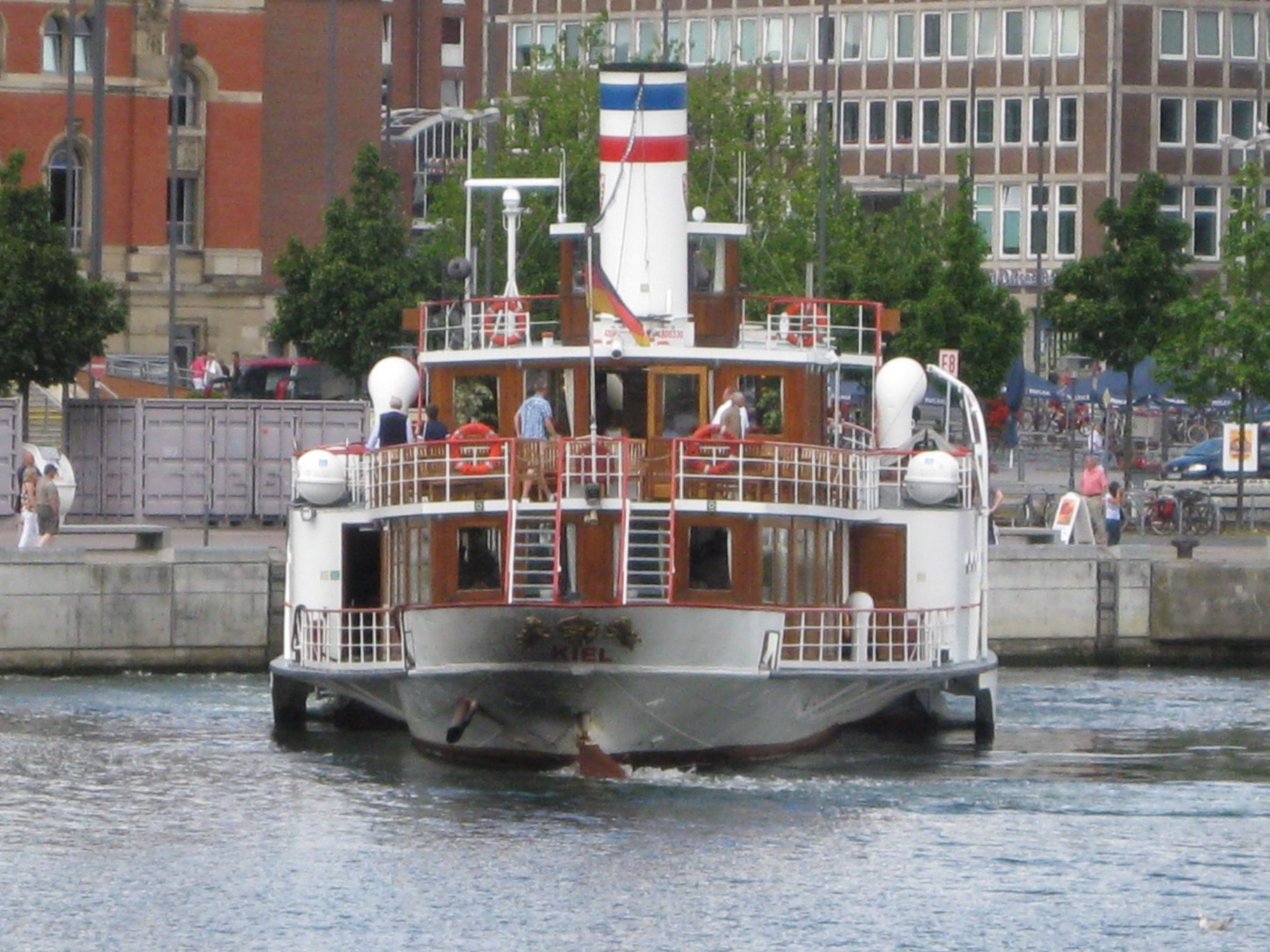 Raddampfer Freya - Heckansicht {